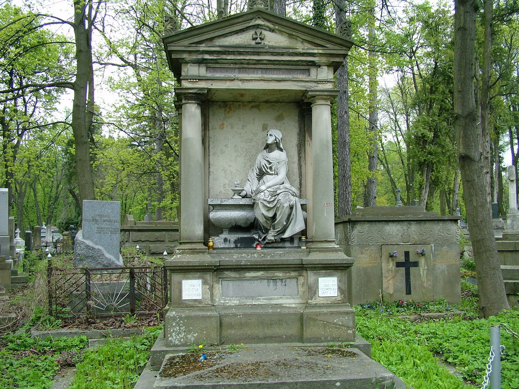 Grobowiec Krzeczunowiczów na cmentarzu Łyczakowskim we Lwowie, gdzie pochowany jest prof. Przemysław Dąbkowski, maj 2005. Autor fot.: Stako 09:05, 2 wrz 2005 (CEST)~